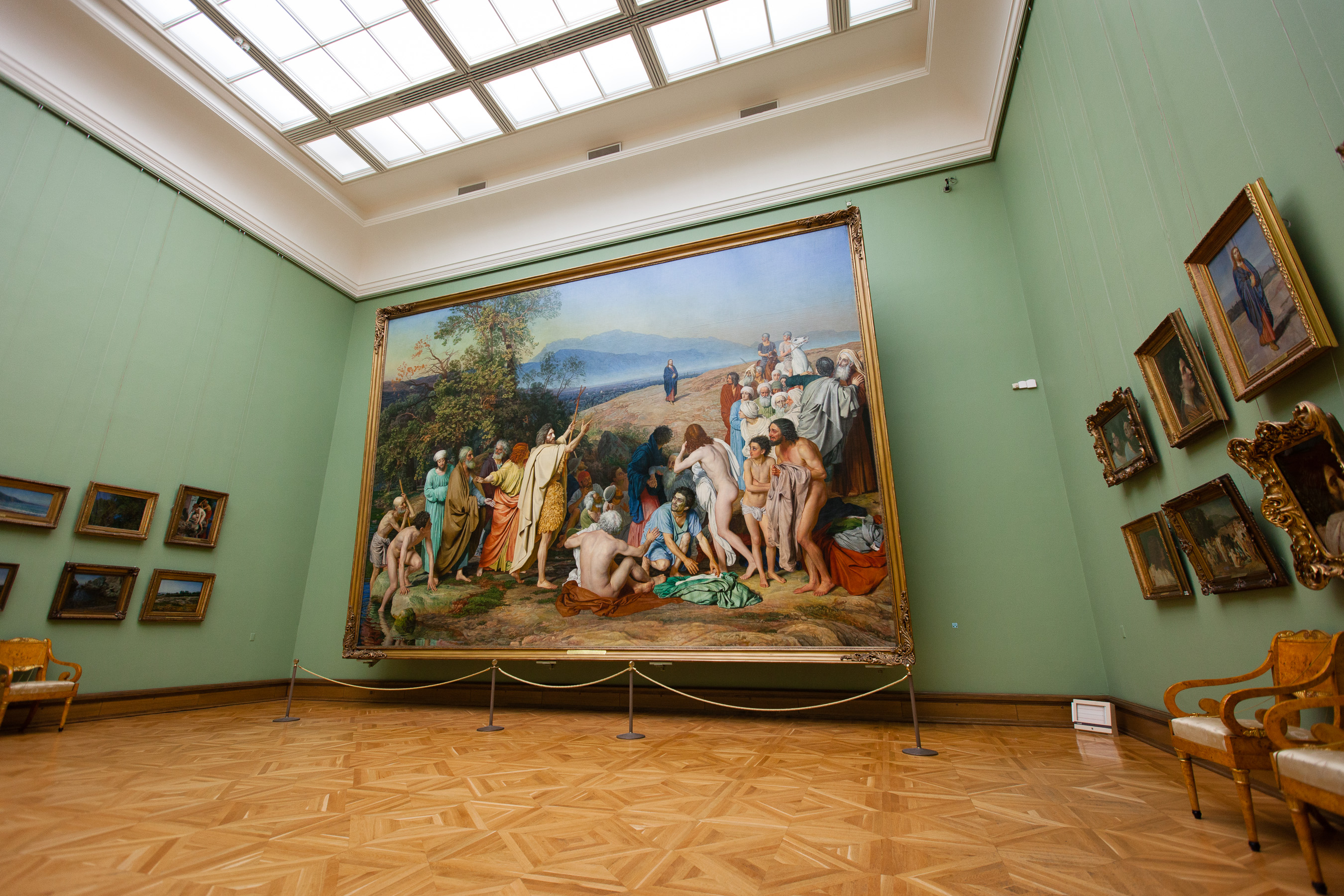 Moscow